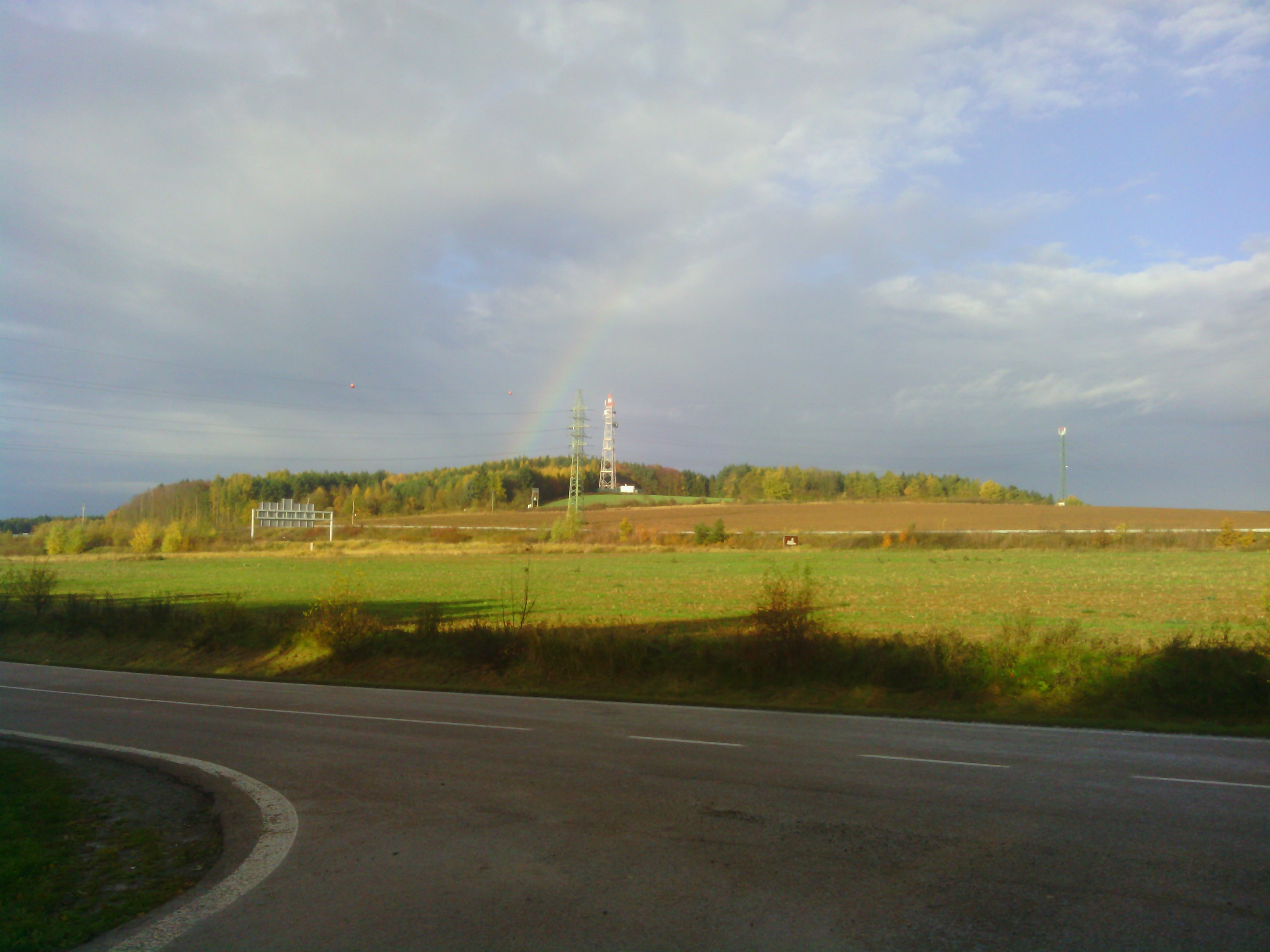 Vrch Val od silnice z Plzně-Černic do Štěnovic.